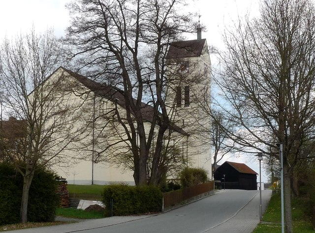 Oberwildenau: Kirche St. Michael